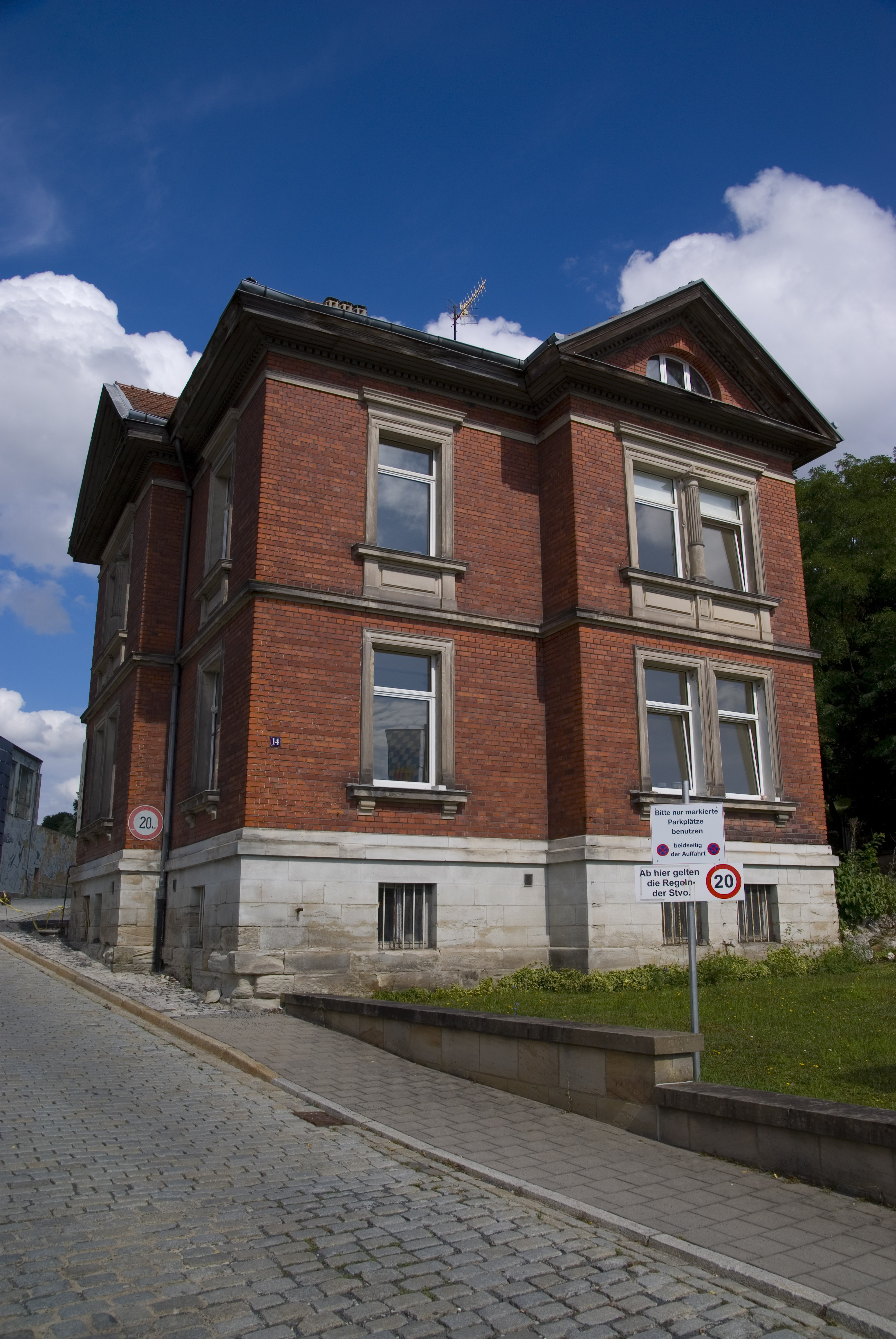 Hofbräuhaus in Coburg, Bayern. Nebengebäude